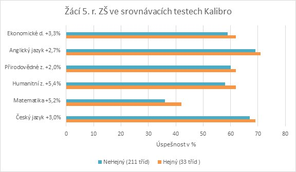 Tento graf znázorňuje výsledky průzkumu společnosti Kalibro ohledně úspěšnosti žáků vyučovaných Hejného metodou.